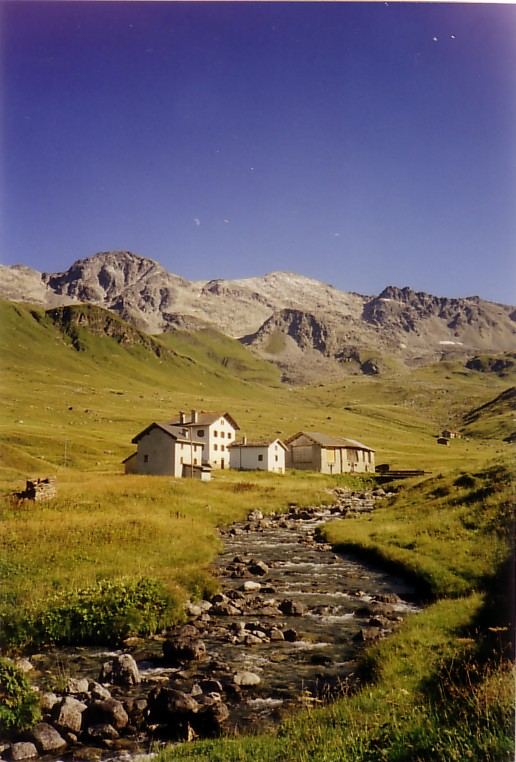 Auf dem Weg zu Septimerpass.